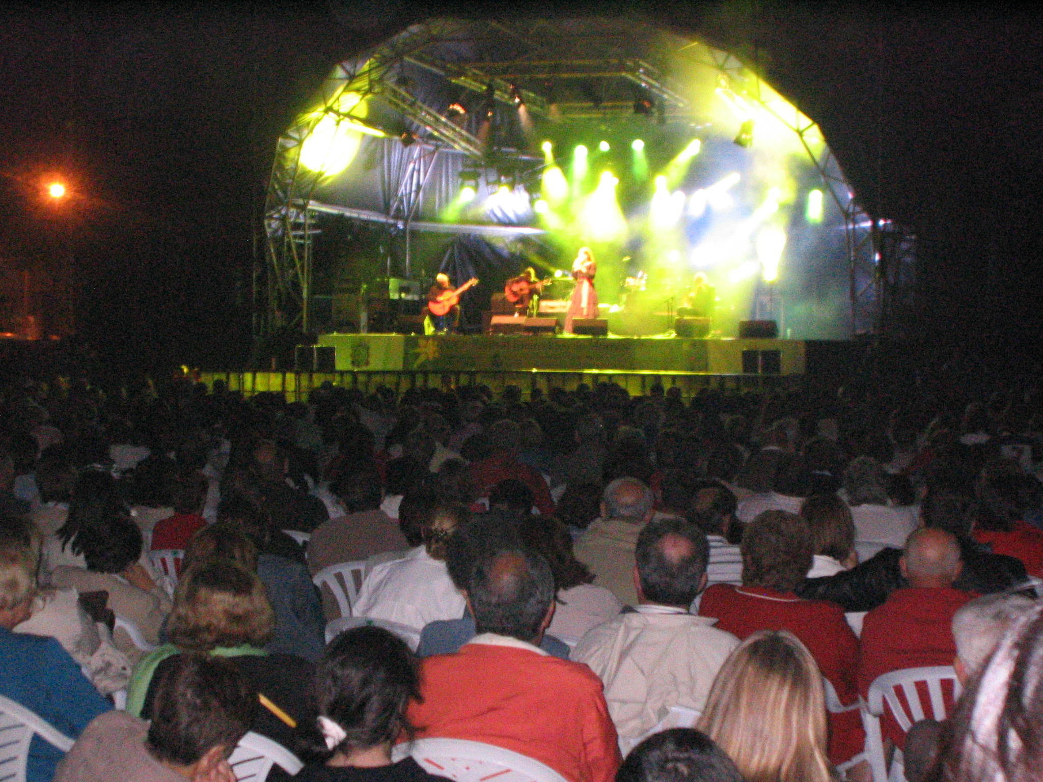 Instantanea en una actuación del XXV Festival Intercéltico del Morrazo en Moañoa (Galicia, España).